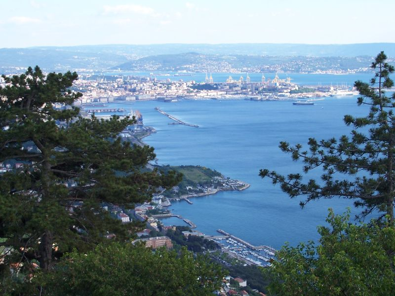 Trieste, Friuli Venezia Giulia, Italia